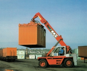 Reach stacker PPM 10 GMI